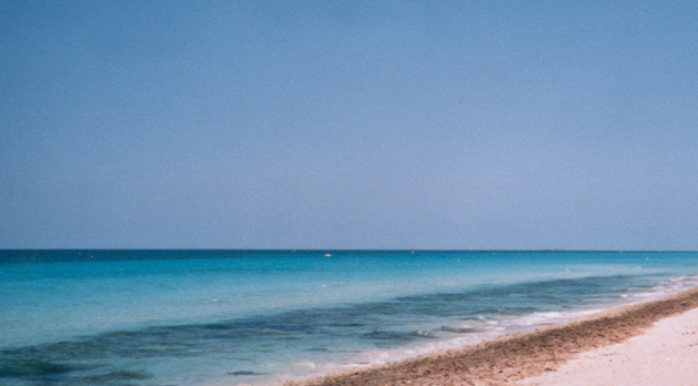 Mer des Caraïbes 2005 Photo:M.Maigne